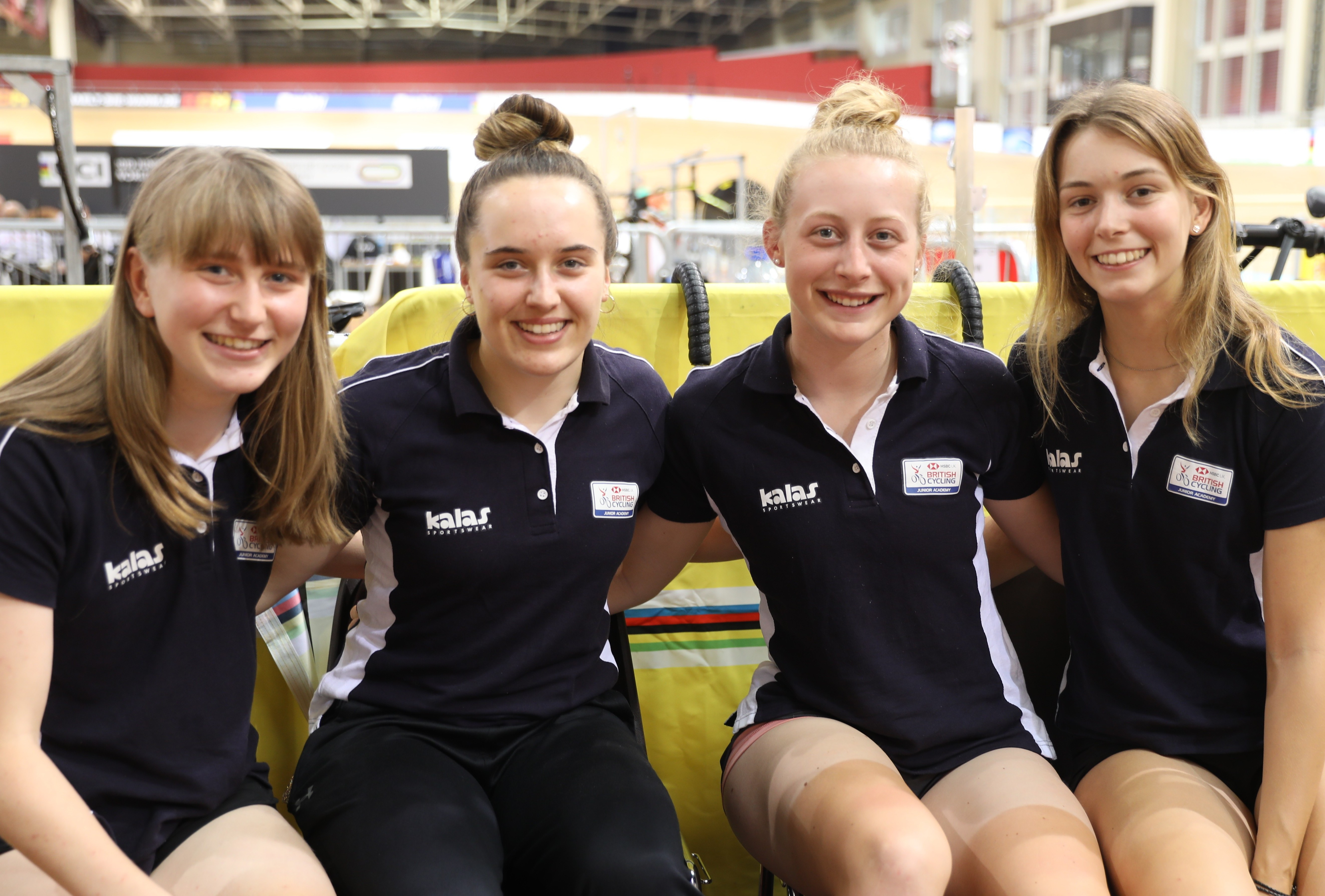 Frauen-Vierer aus Großbritannien (v.l.n.r.): Eluned King, Ella Barnwell, Elynor Bäckstedt, Sophie Lewis